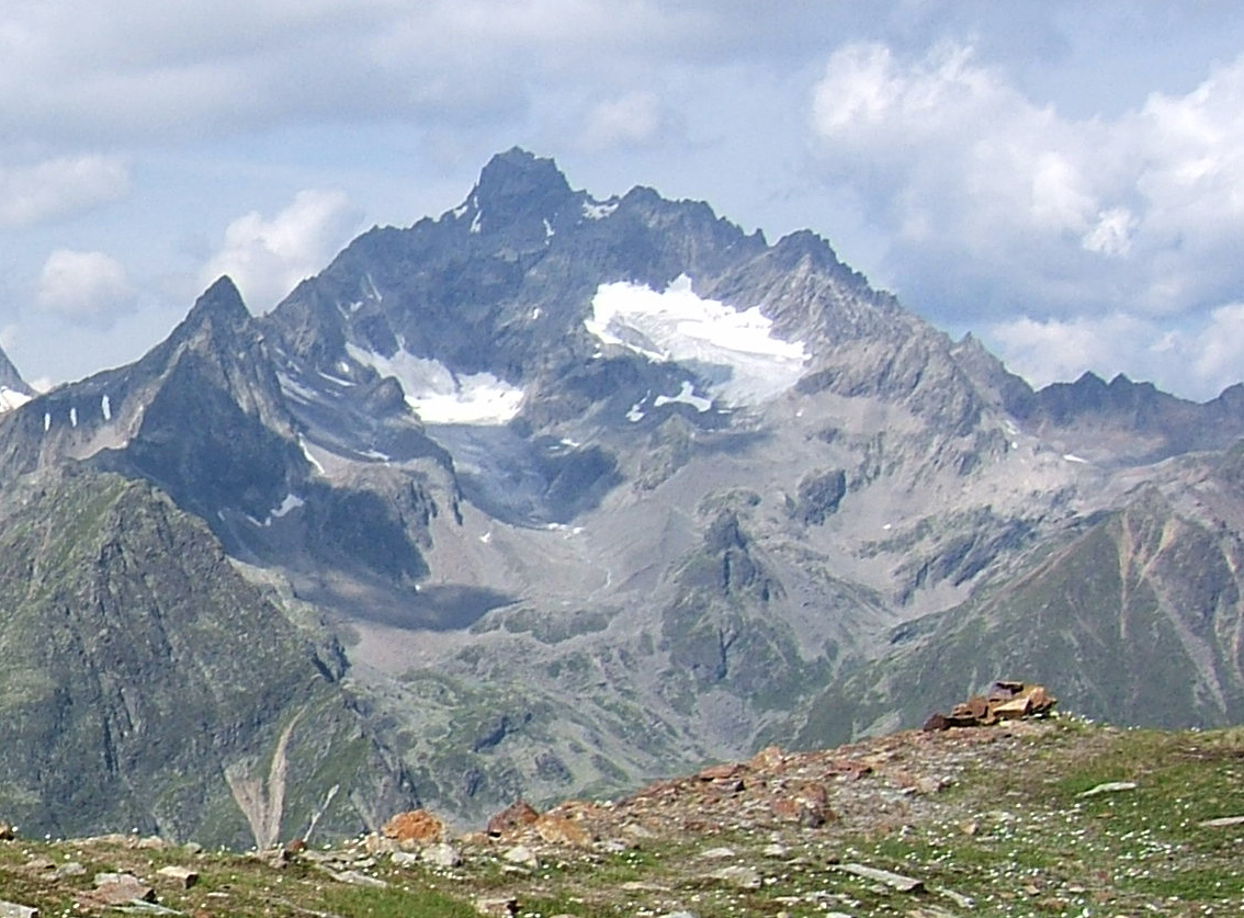 Verpeilspitze from East